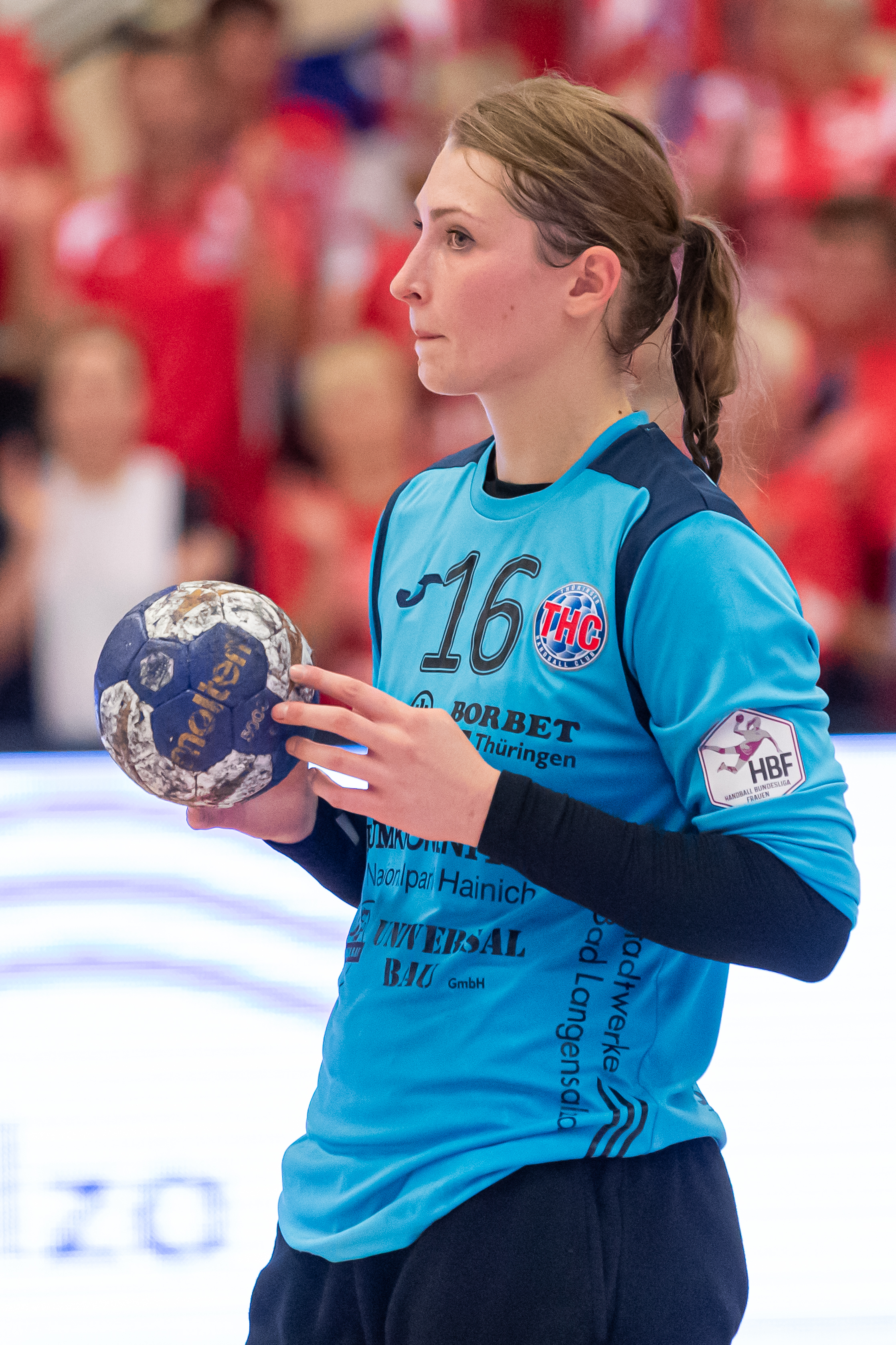 Handball, 1. Bundesliga Frauen, Thüringer HC - Buxtehuder SV; Ann-Cathrin Giegerich (Thüringer HC, 16, Torhüter); Freisteller, Einzelbild